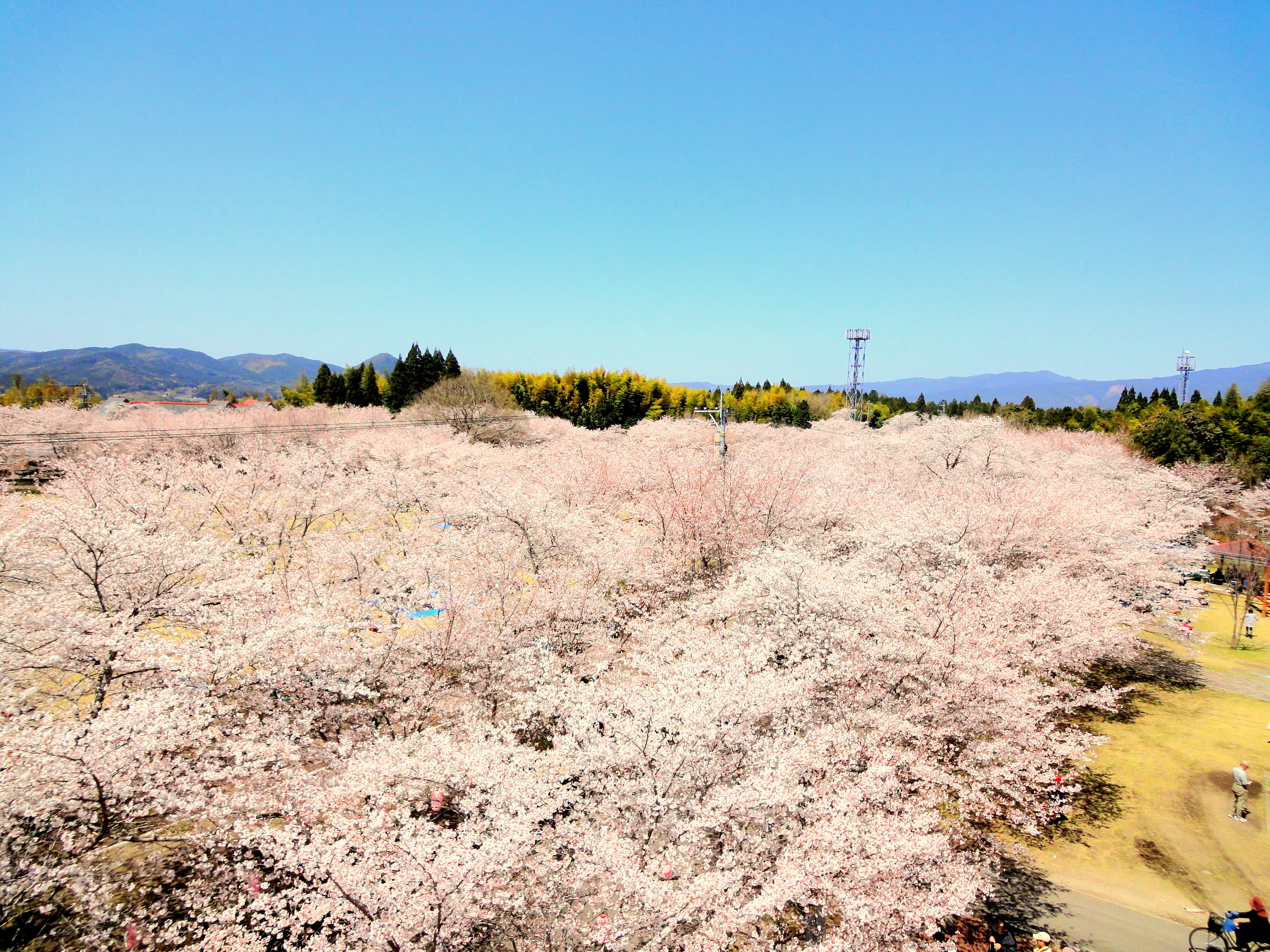 2012/4/1、忠元公園桜まつり（クレーン車の上より）。さくら名所100選に選ばれている。